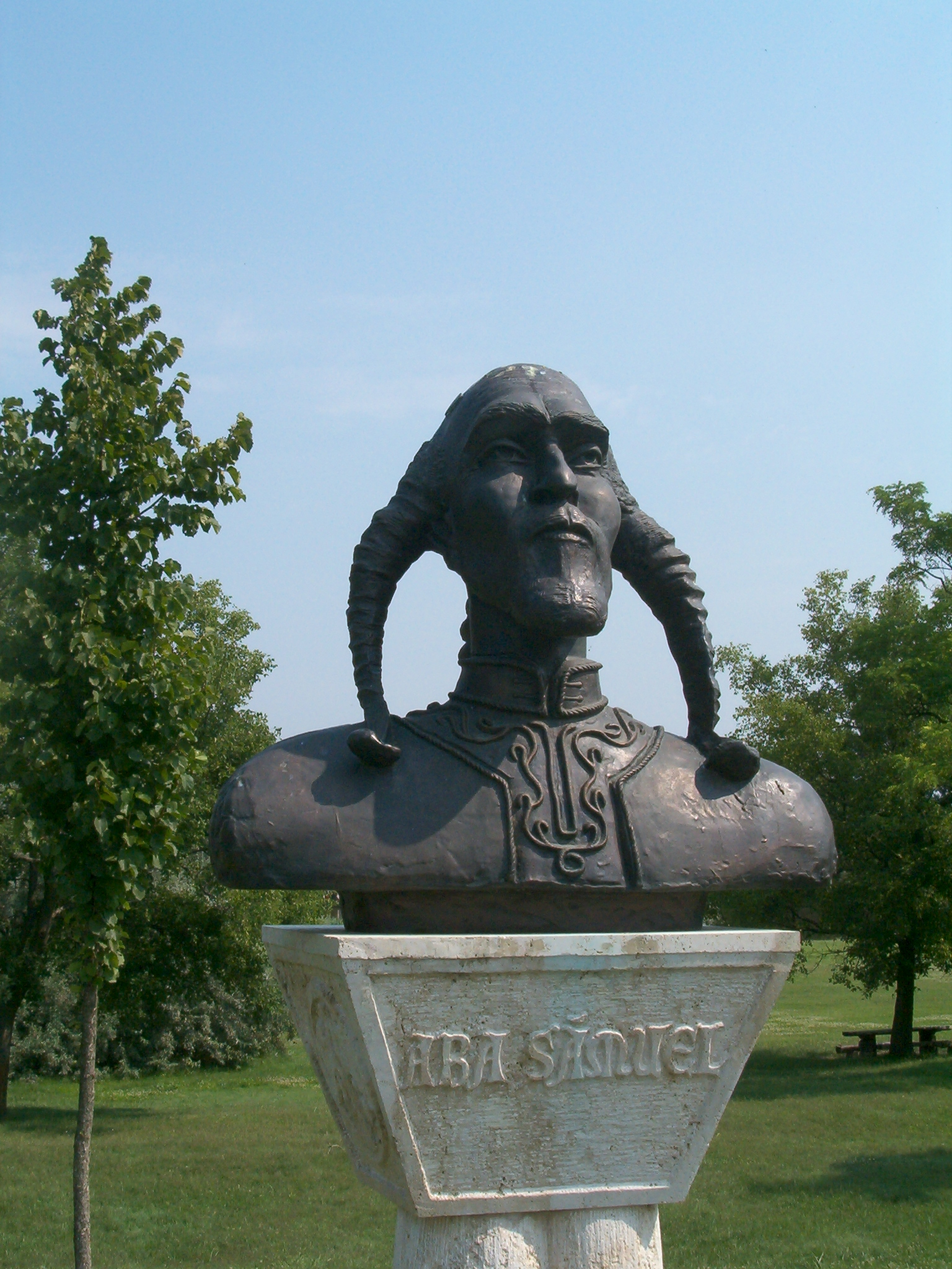 Aba Sámuel király Nemzeti Történeti Emlékpark / National Historical Memorial Park in Ópusztaszer, Hungary (Kő Pál alkotása) self shot photo (2005), Váradi Zsolt